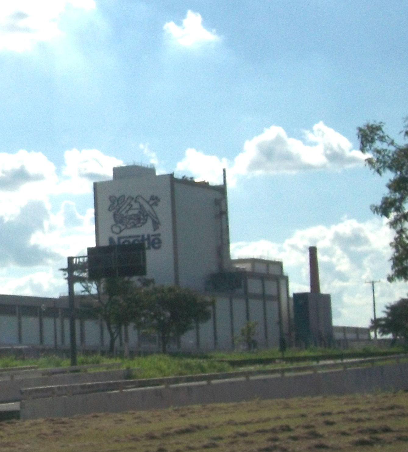 Nestlé unidade de Araçatuba.